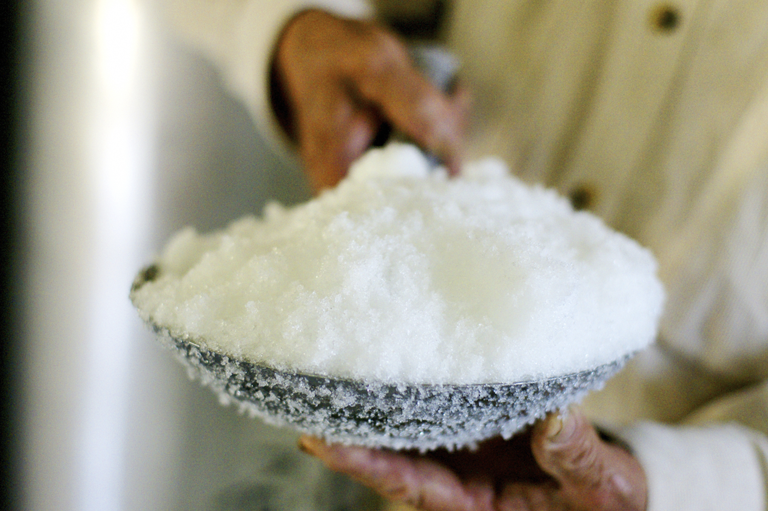 樟腦沙，可用於除臭或是藥用。